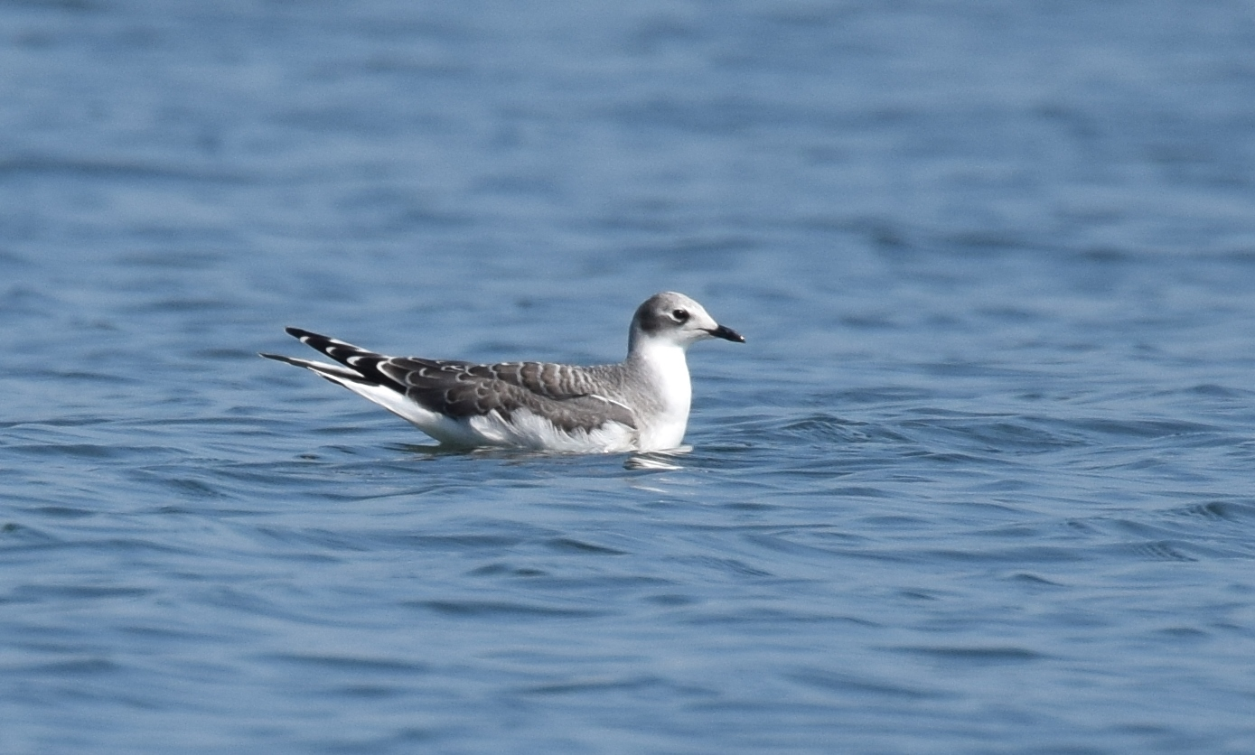 Smithville Lake Smithville, MO 9/20/16